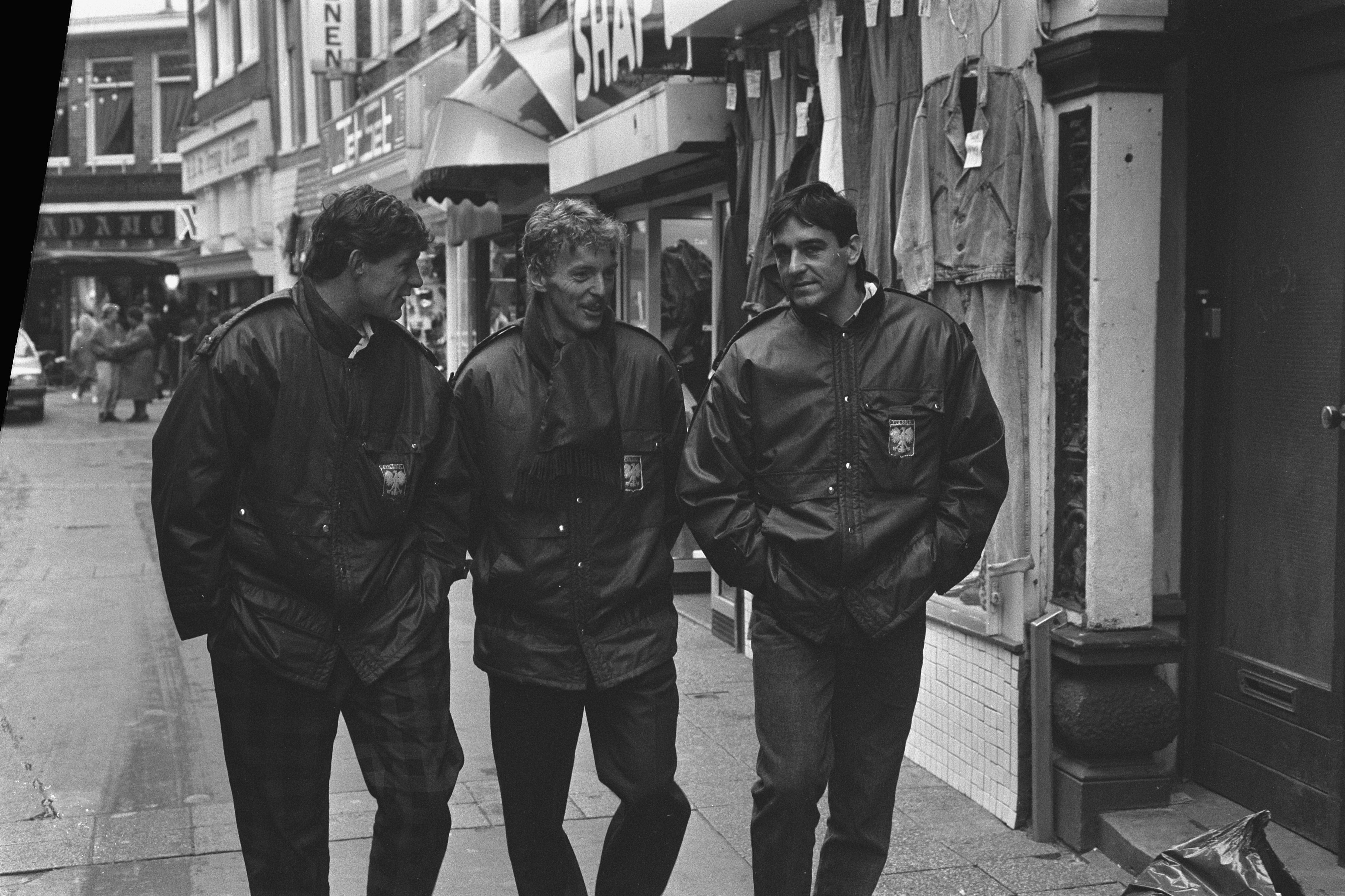 Collectie / Archief : Fotocollectie Anefo Reportage / Serie : [ onbekend ] Beschrijving : Spelers Pools nationaal elftal in centrum Amsterdam; v.l.n.r. Smolarek, Boniek en Kazmierski Datum : 18 november 1986 Locatie : Amsterdam, Noord-Holland Trefwoorden : SPELERS, centra, elftallen, sport, voetbal Persoonsnaam : smolarek Fotograaf : Molendijk, Bart / Anefo Auteursrechthebbende : Nationaal Archief Materiaalsoort : Negatief (zwart/wit) Nummer archiefinventaris : bekijk toegang 2.24.01.05 Bestanddeelnummer : 933-8180